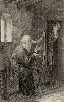 "Der Harfner", Illustration (Kupferstich) von Gustav Heinrich Naeke (1786-1835) zu Goethes "Wilhelm Meister" Sonstiges: Kein Copyright mehr (s.o.)